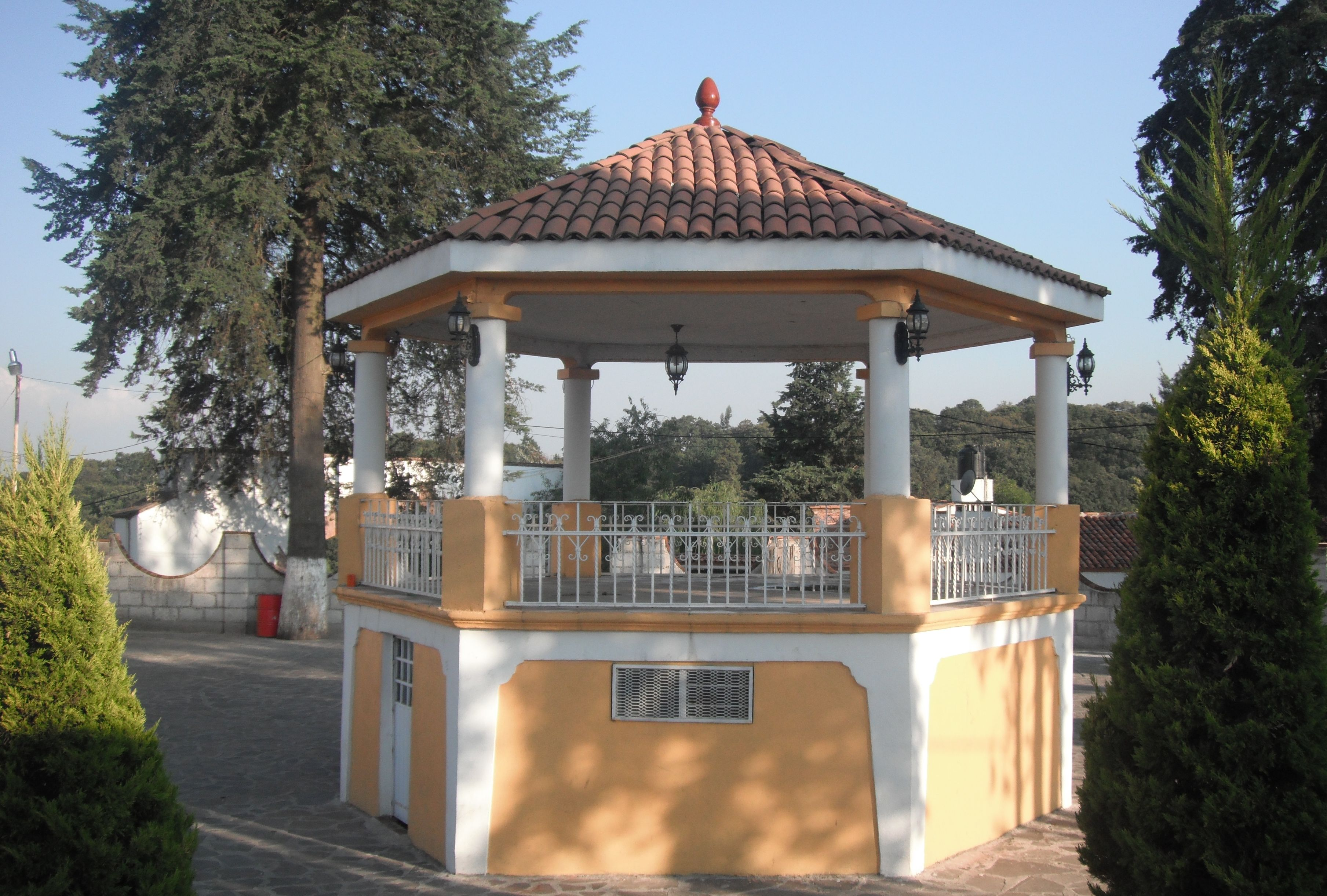 kiosco de cahuacan